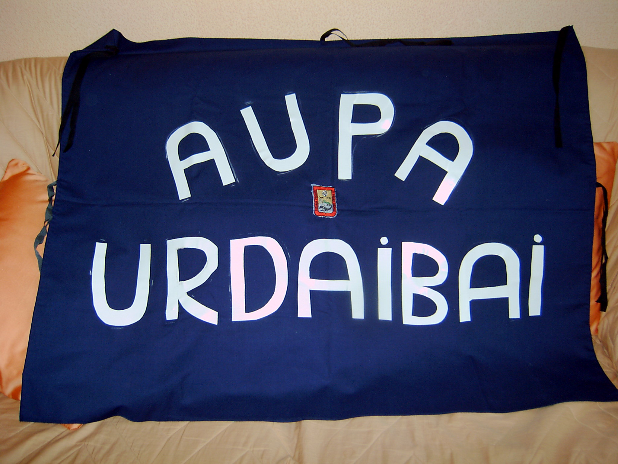 Urdaibai arraun elkartea animatzeko bandera